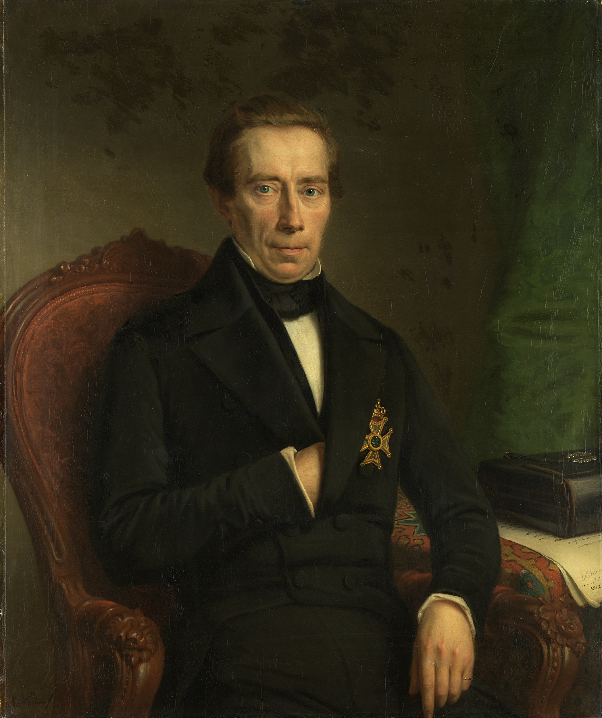 Johan Rudolf Thorbecke (1796-1872). Minister van Staat en minister van binnenlandse zaken. Kniestuk, zittende in een stoel naast een tafel waarop brieven en een aktetas liggen. De rechterhand in de jas gestoken, op de borst het kruis van de orde van de Nederlandse Leeuw.